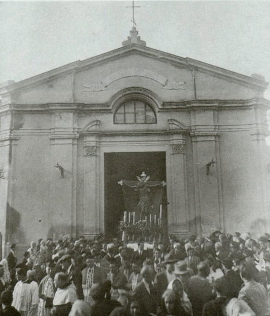 Immagine antica della processione del Santissimo Crocifisso, all'uscita dall'omonima chiesa di Palmi.